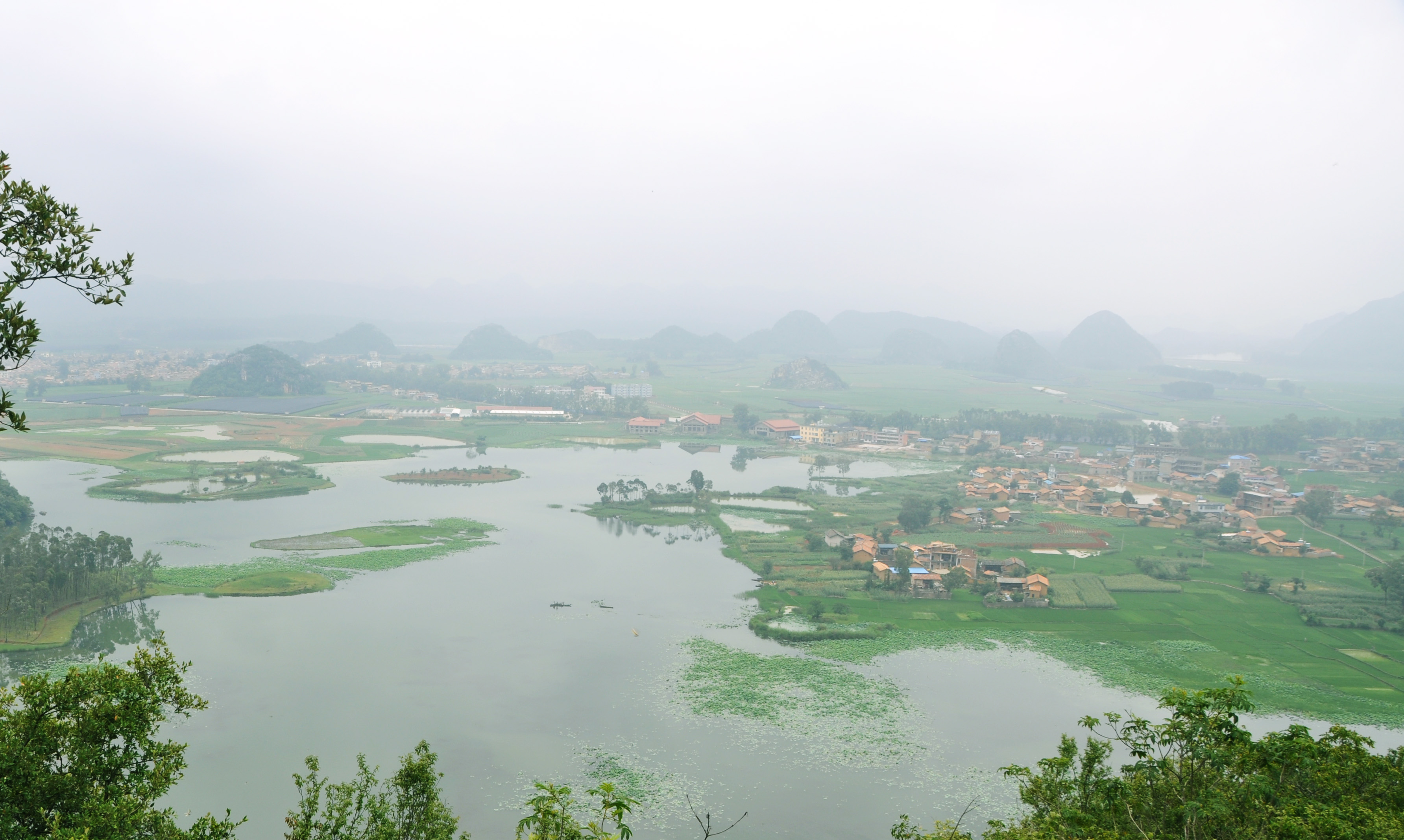 中国云南普者黑景区，拍摄于青龙山观景台。